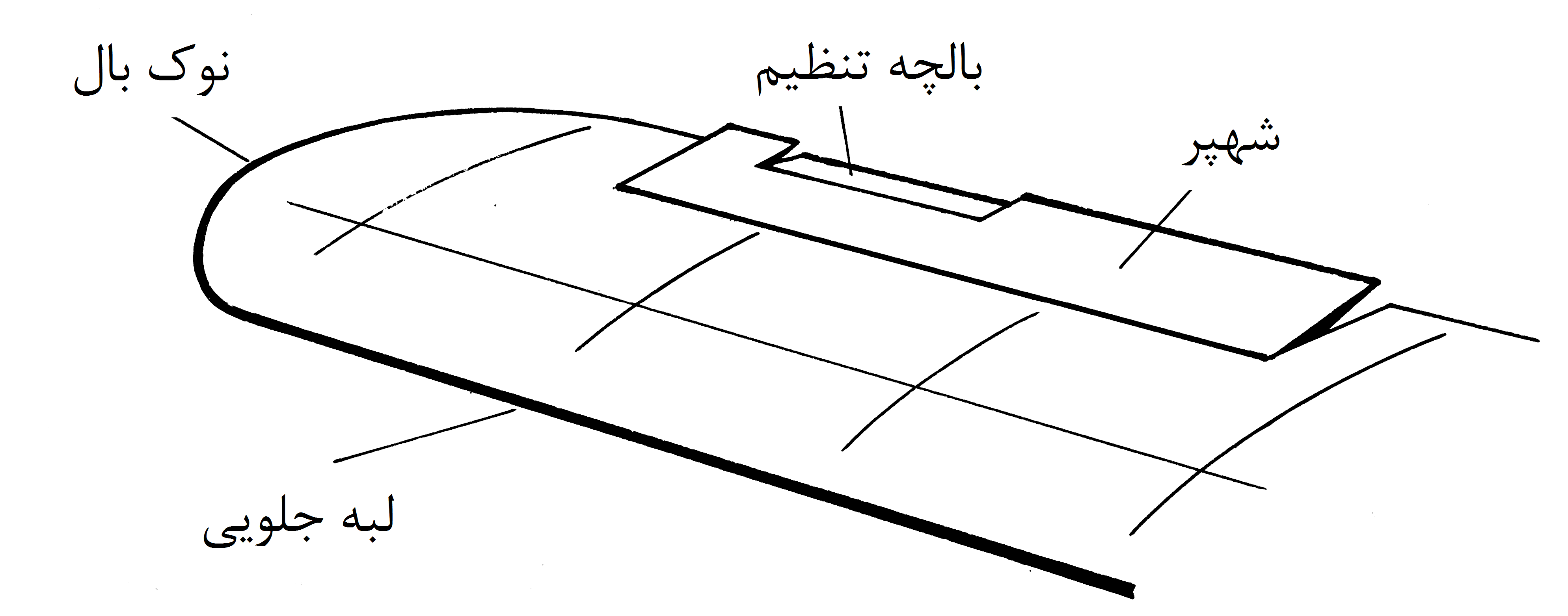 Alieron